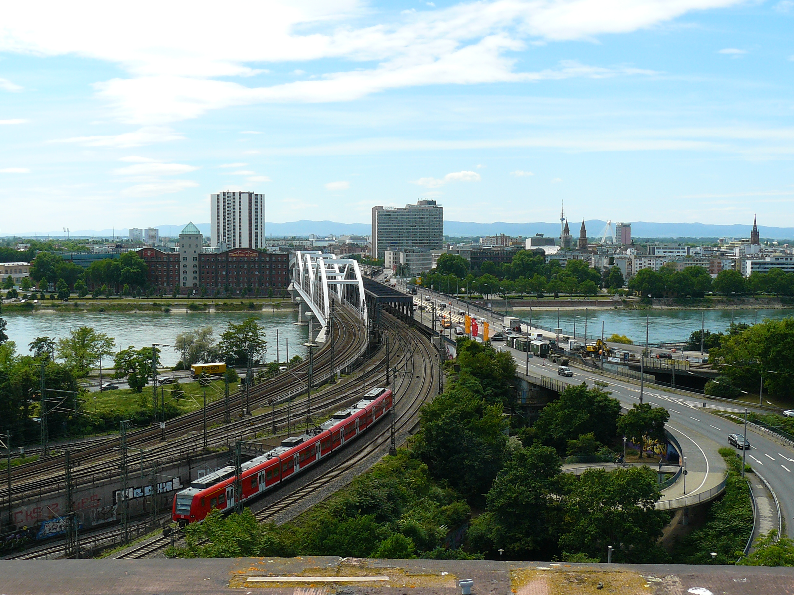 Blick in Richtung Rhein, Eisenbahn- und Theodor-Heuss-Brücke nach Ludwigshafen